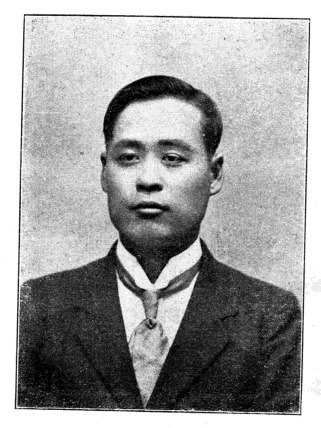 中文（台灣）: 中華民國國會議員